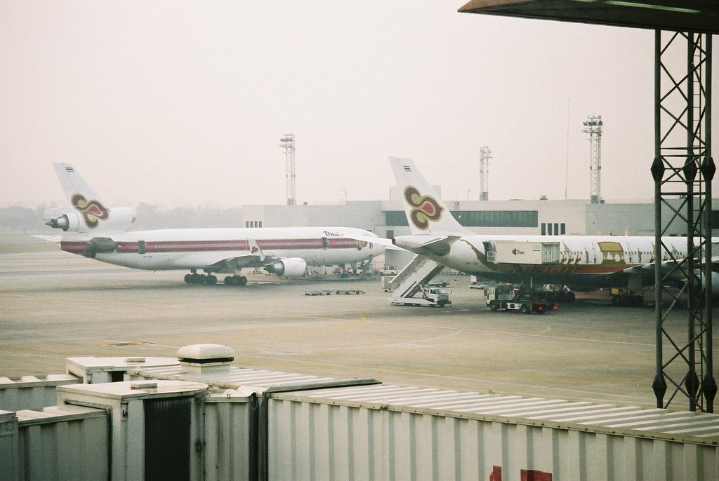 MD-11 と A330 の特別塗装機(ロイヤルバージ)がいました。(2005/01/30 Bangkok Donmuang International Airport, Bangkok, THAILAND)